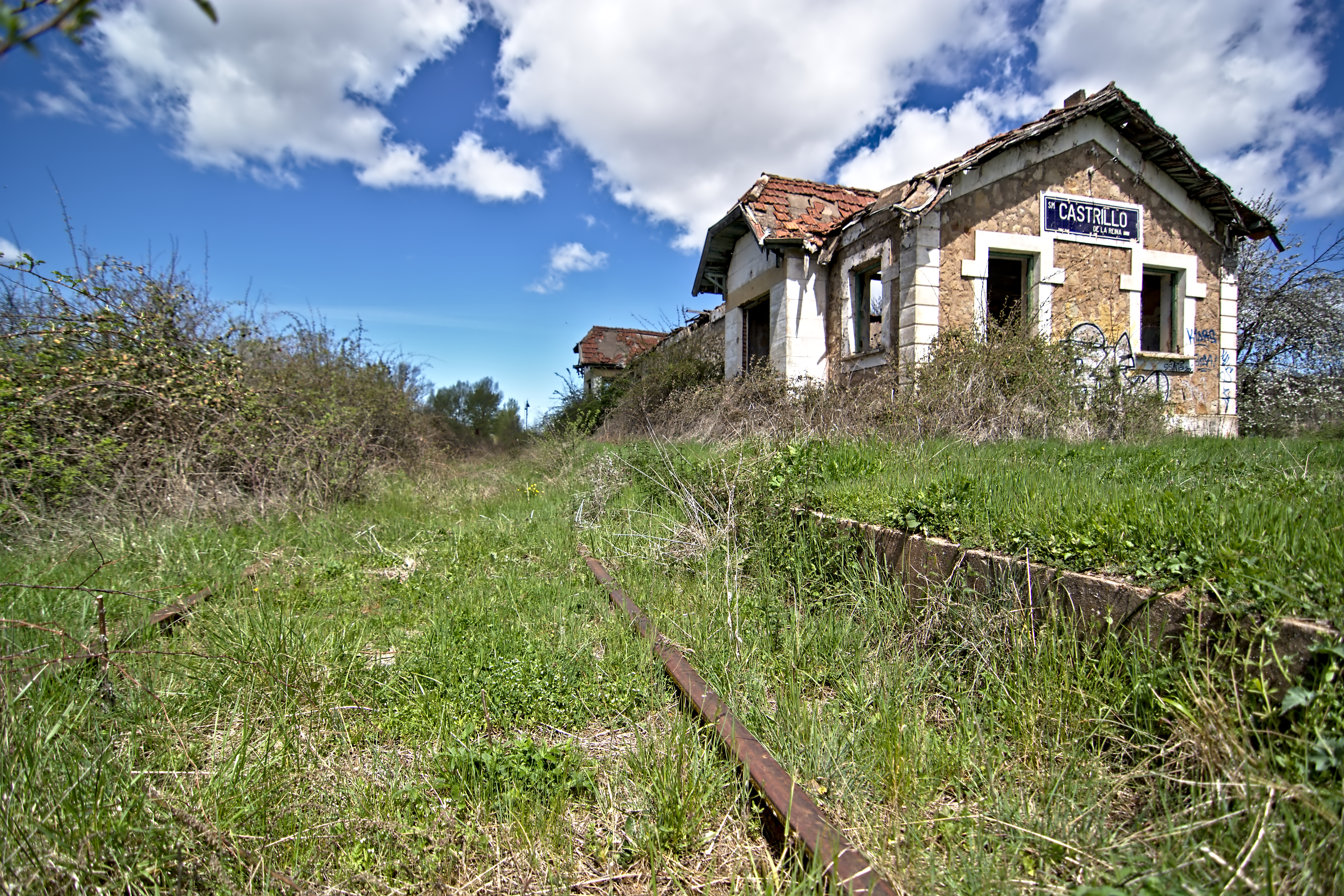 Castrillo de la Reina